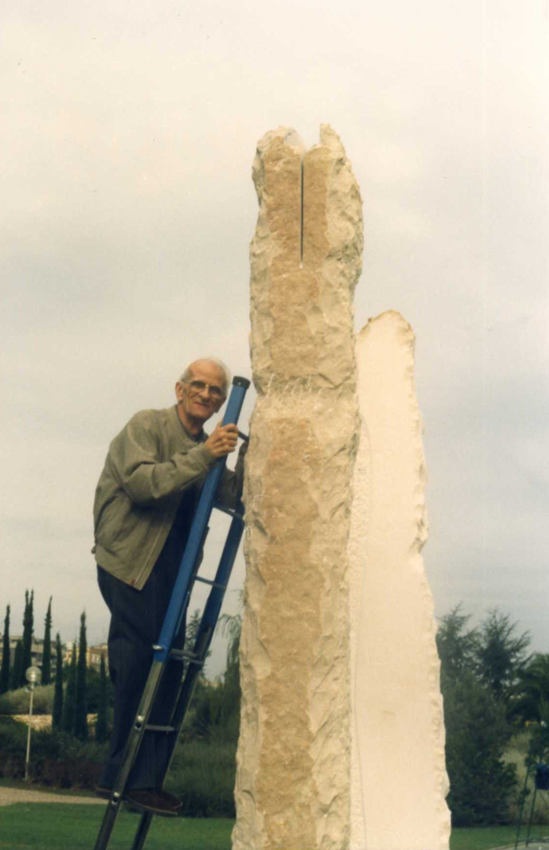 Antonio Rini controlla l'esecuzione della Grande Meridiana di Bari che ha progettato insieme a Francesco Azzarita